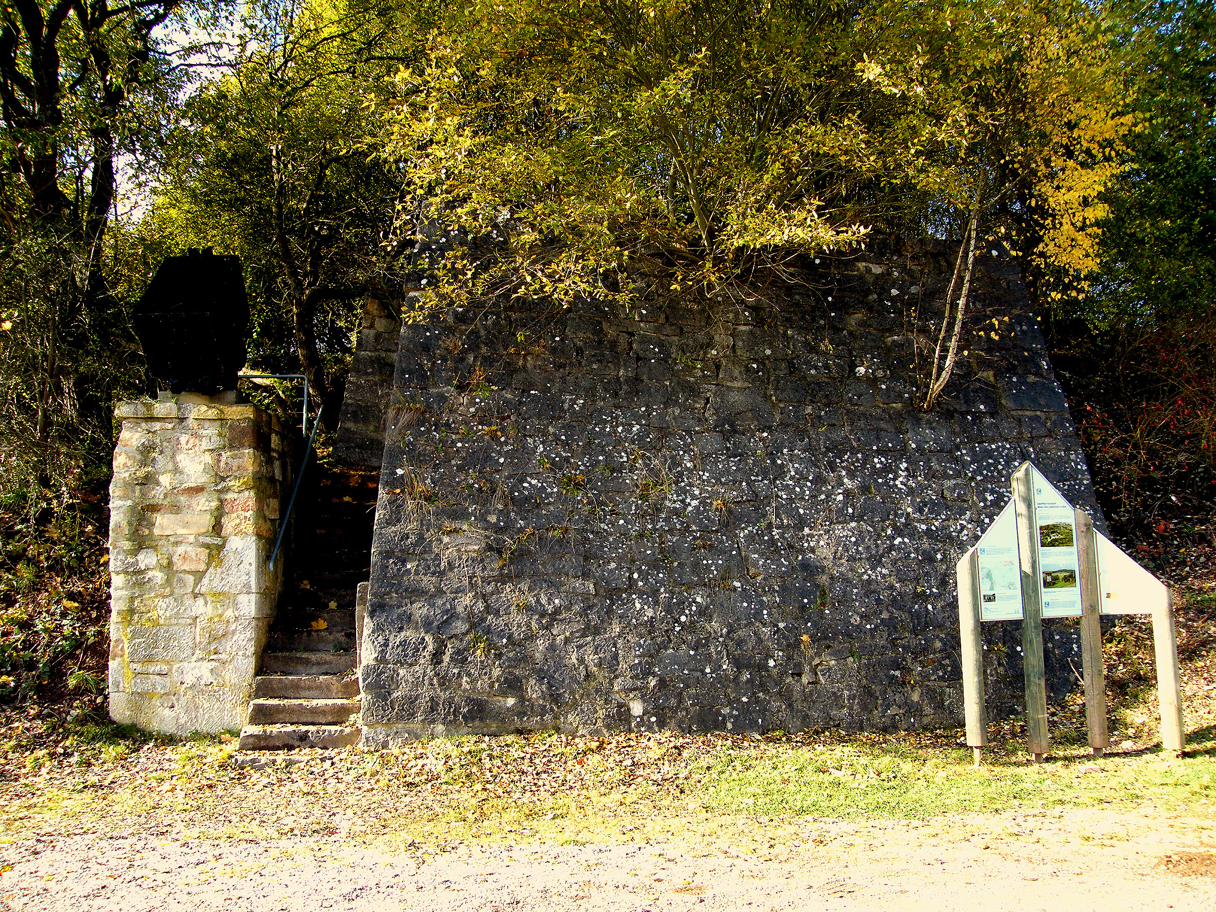 Kreisberufsschule Waldeck-Frankenberg 34497 Korbach, Kasseler Straße Korbacher Spalte - ehem. Kalkofen am Eingangsbereich